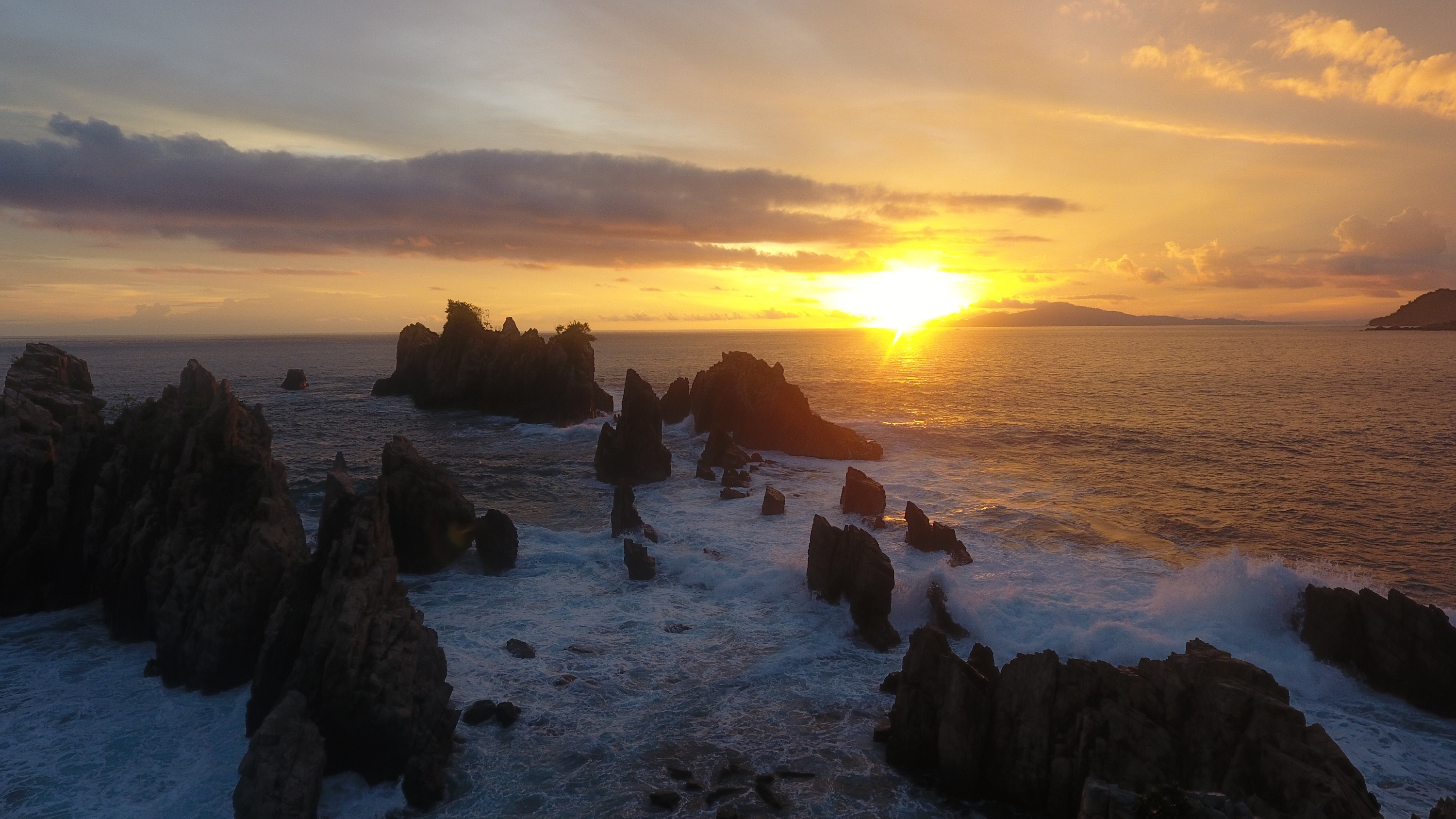 Wisata alam ini benama Batu layar. Namun, para pengunjung kemudian memberi nama Gigi Hiu karena bentuknya yang runcing dan tak beraturan seperti gigi hiu. Objek Wisata Gigi Hiu terletak di Pekon Negeri Kecamatan Kelumbayan Kabupaten Tanggamus. Waktu tempuhnya sekitar 3-4 jam perjalanan dari Bandar Lampung.